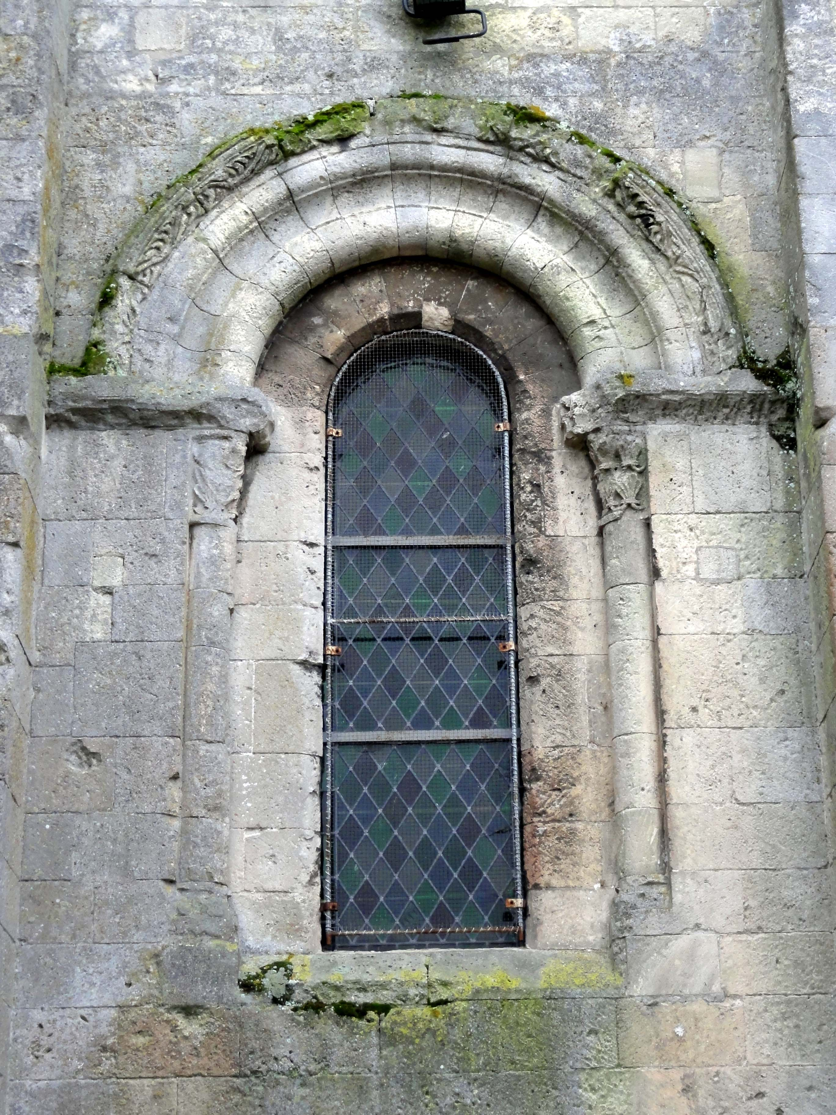 Base du clocher, fenêtre côté nord (à l'extérieur).